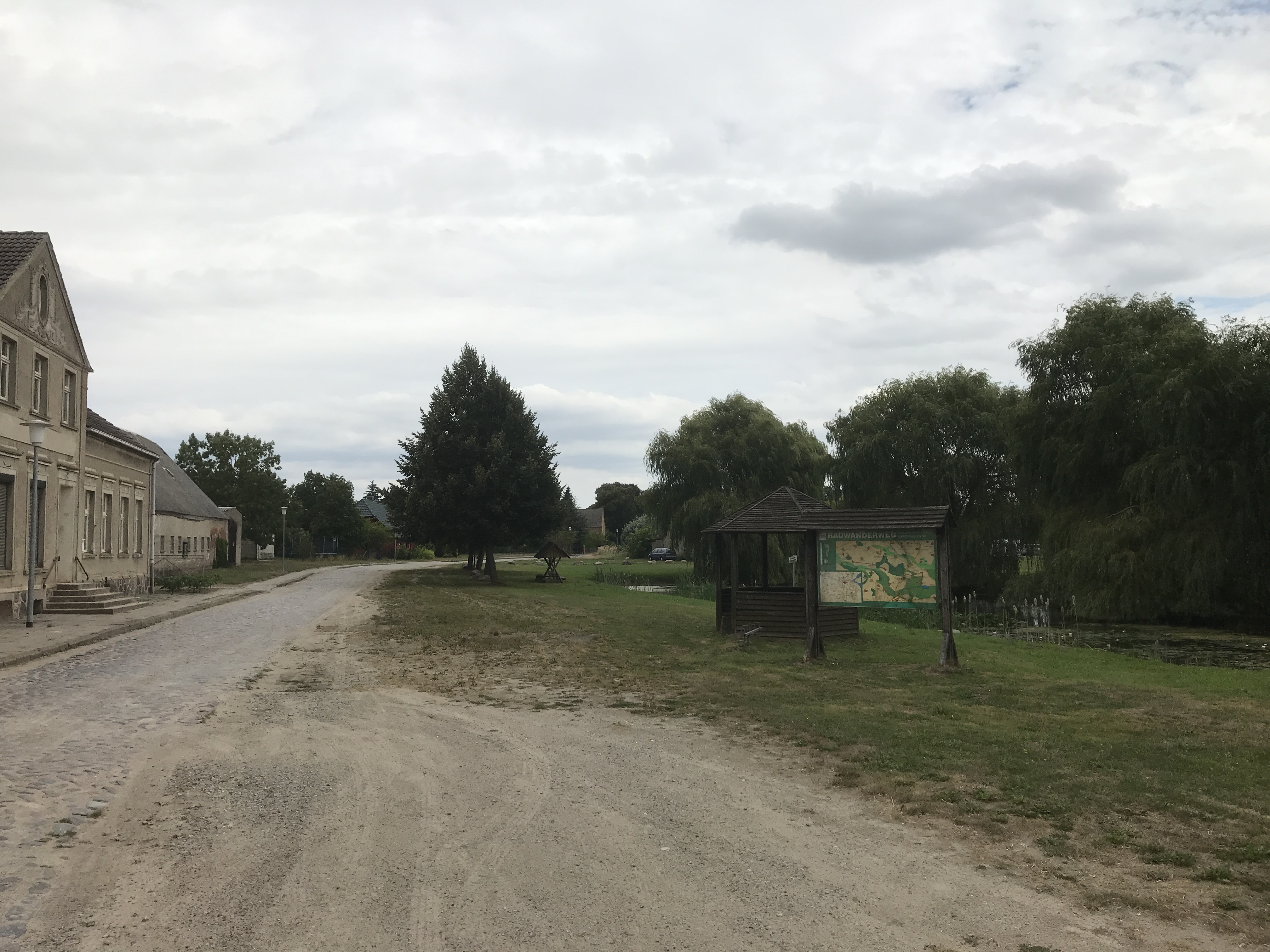 Rebelow, ein Ortsteil der Gemeinde Spantekow in Mecklenburg-Vorpommern